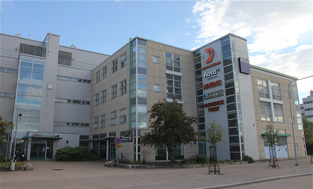 Lääkärikeskus Aavan toimipiste Vantaan Pakkalan kaupunginosassa on eräs Trafin valtuuttamista ilmailulääketieteen keskuksista (AeMC) Suomessa.